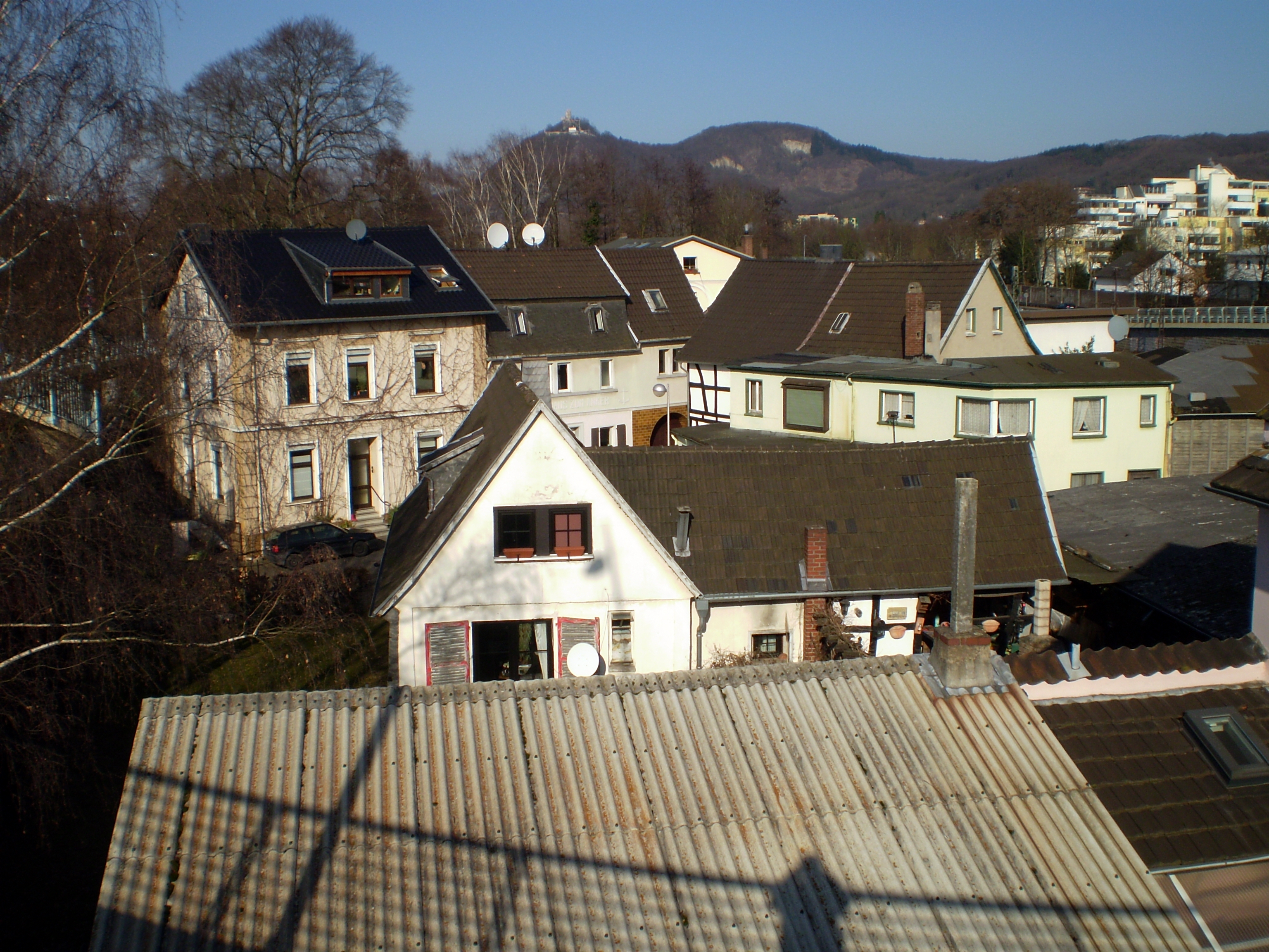 Die Schiffersiedlung Mülheim in Bad Honnef, Ansicht vom Brückenbauwerk Honnefer Kreuz